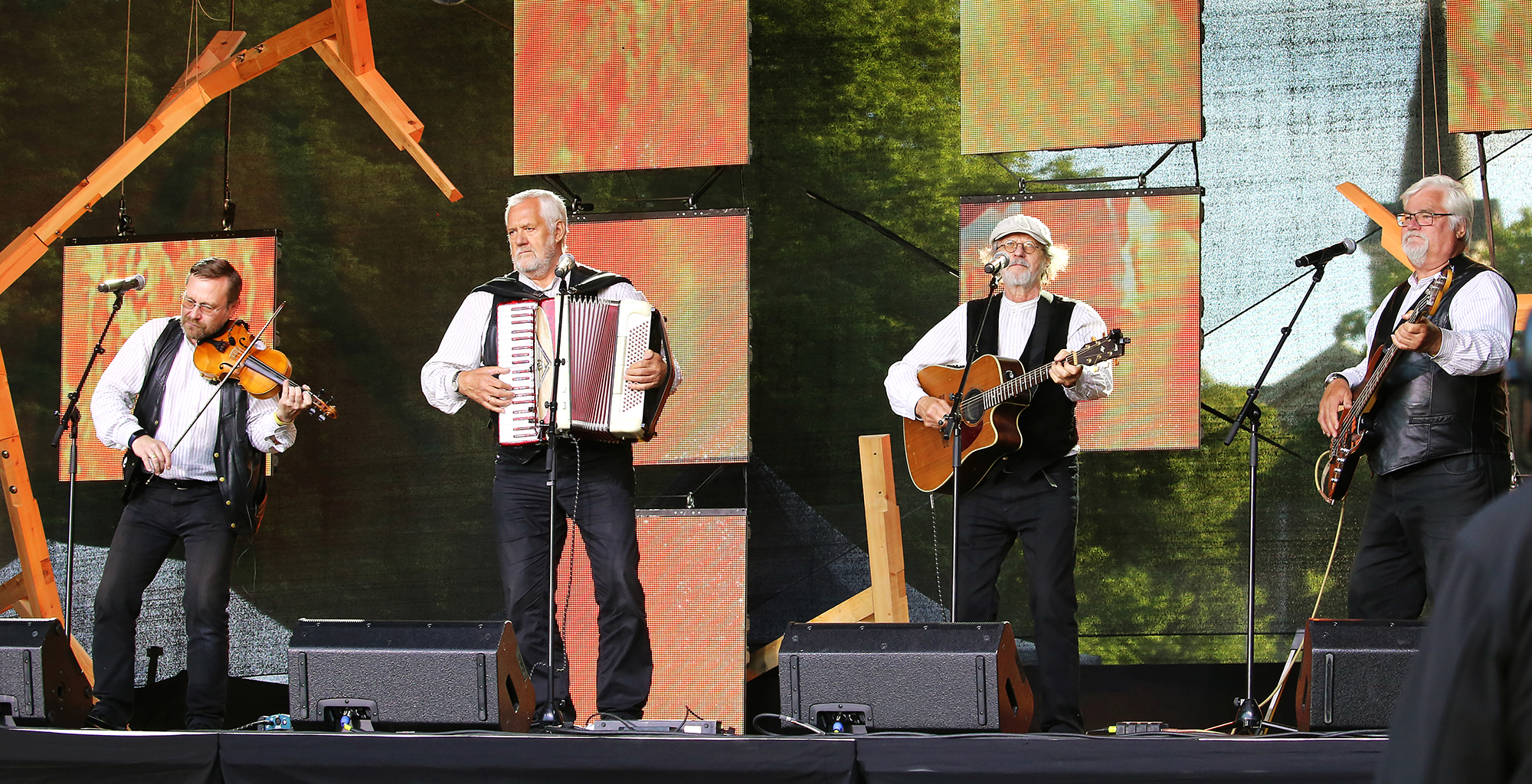 Heiki Vahar, Arne Haasma, Toomas Kõrvits ja Ike Volkov folkansambel Kukerpillid Vabaduse väljakul 17